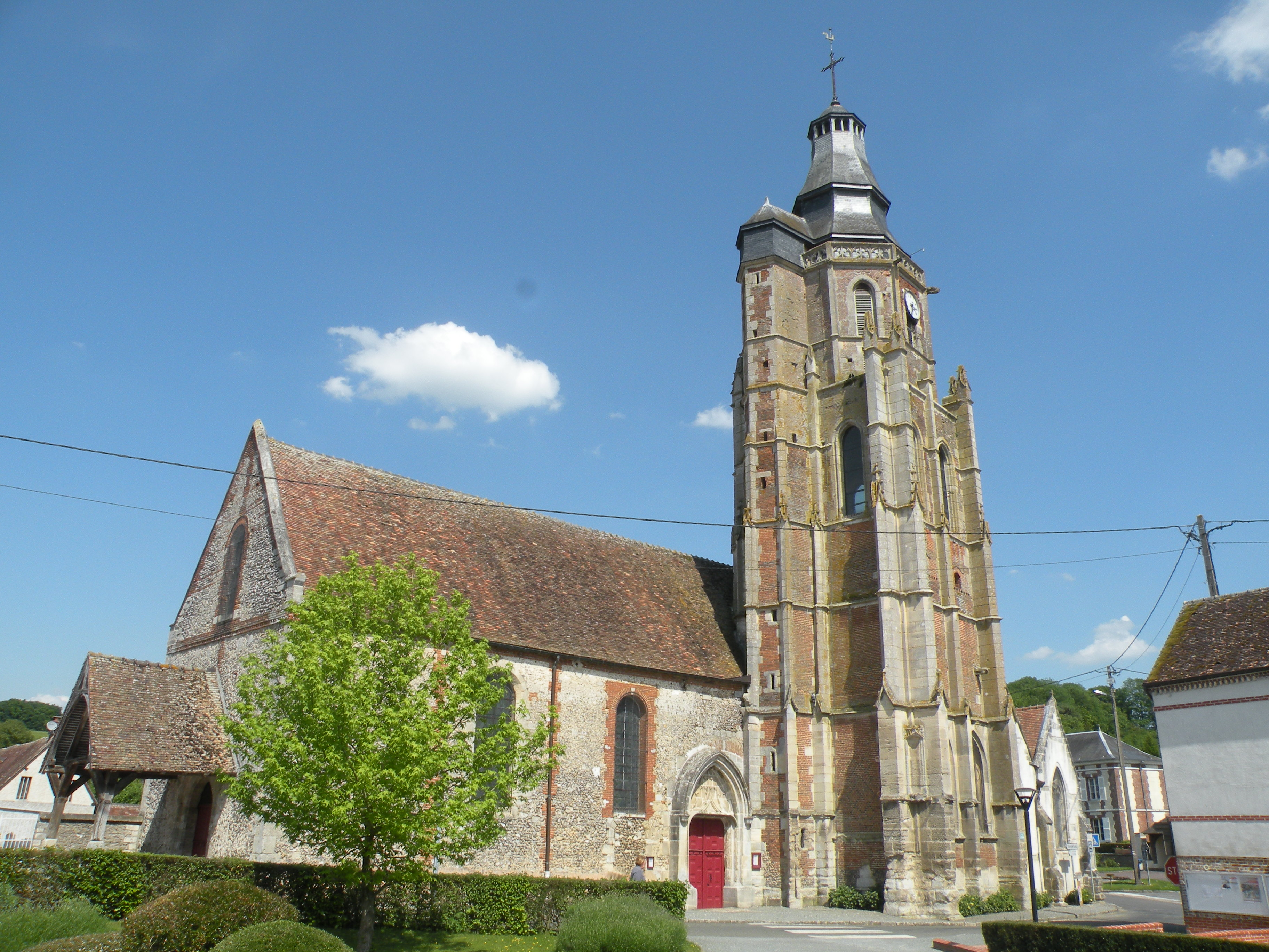 Église Saint-Clair de Flavacourt